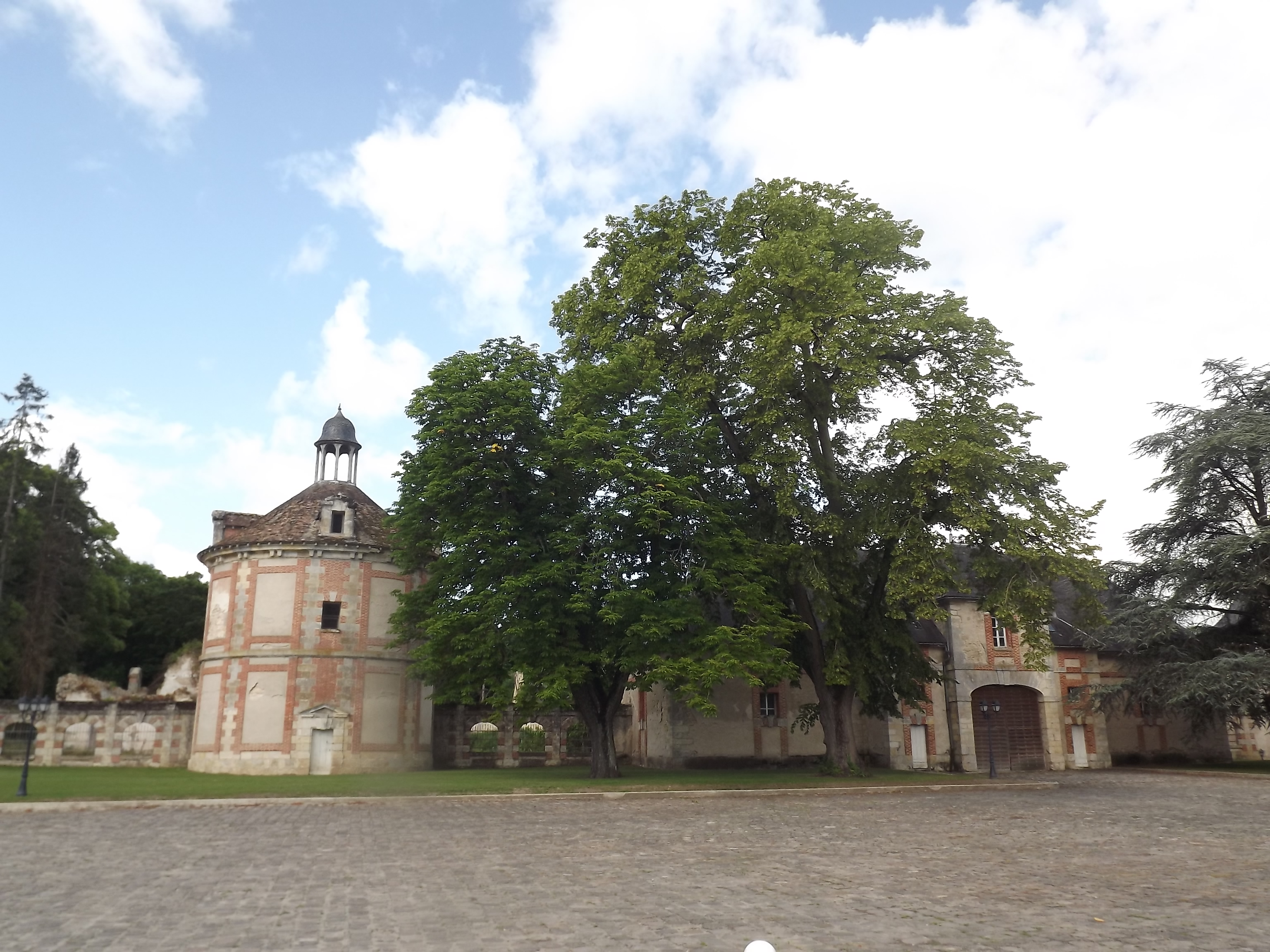 Bâtiments dans l'enceinte du château d'Augerville